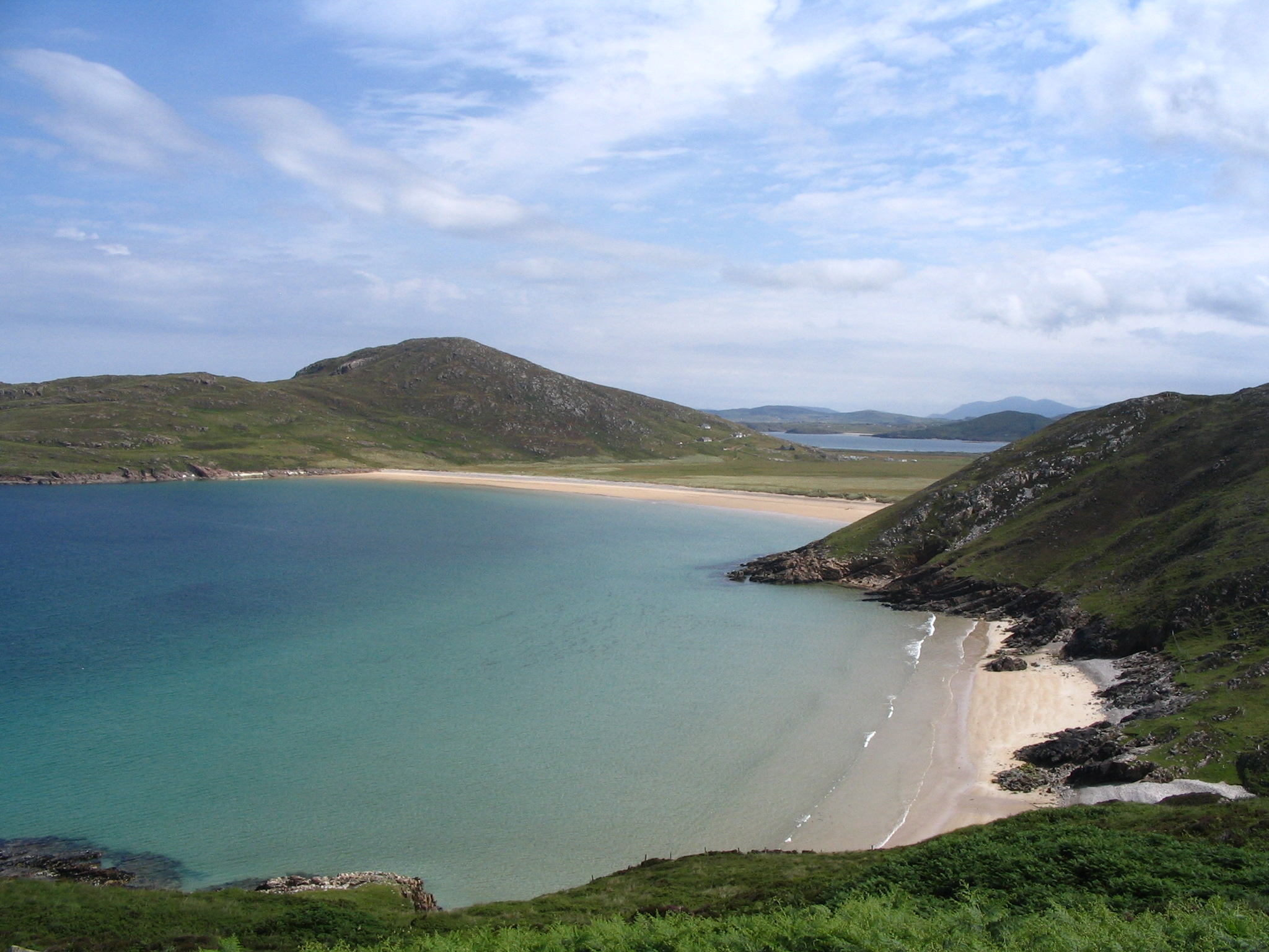 Tranarossann Bay-Rosguill Peninsula